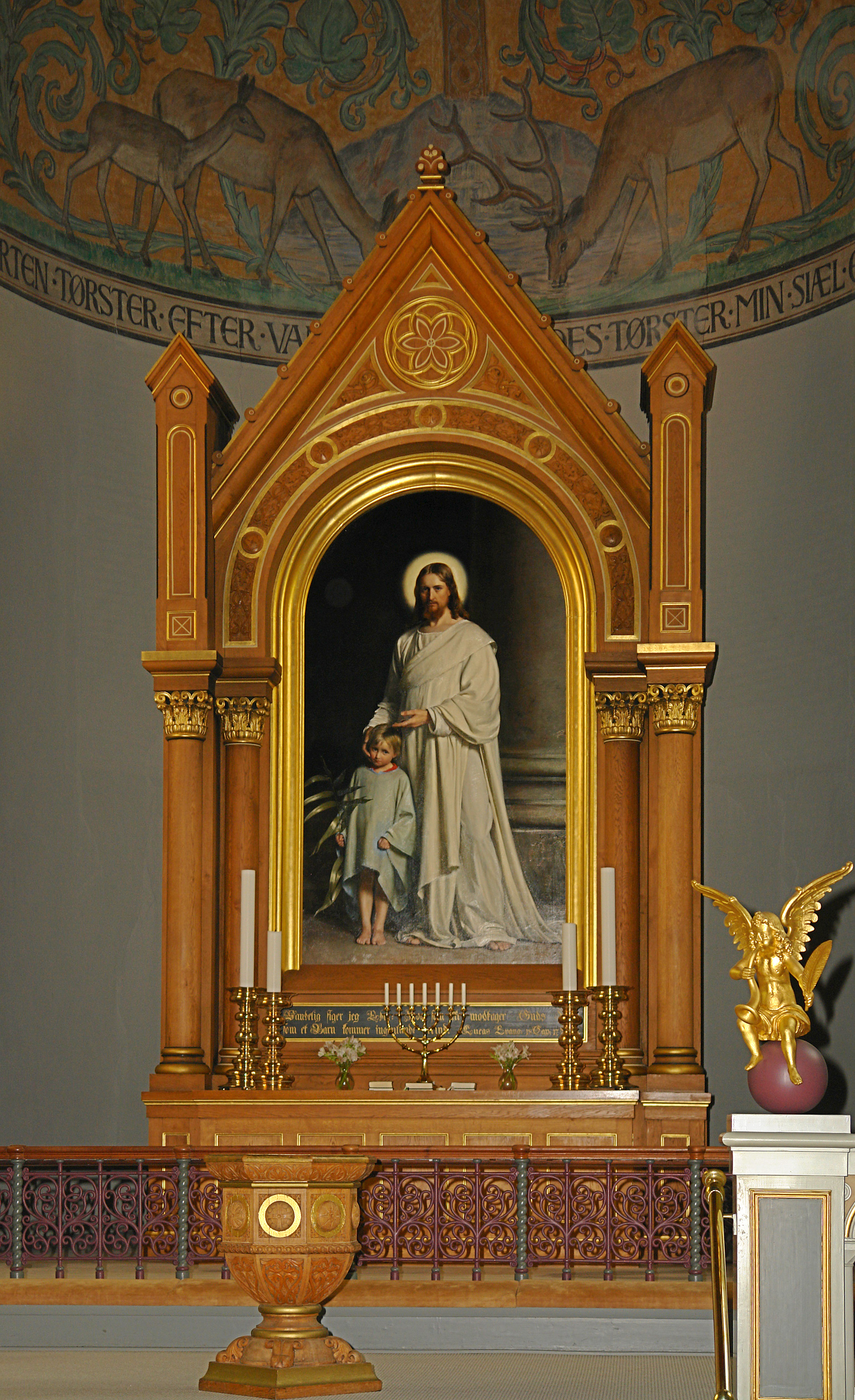 Nikolai Kirche Holbæk, DK: Altarrahmen + Altarschranke + Taufbecken (1872), Altarbild „Jesus und das Kind“ von Carl Bloch (1873), Altarleuchter (1699/1949), siebenarmiger Leuchter (1912)